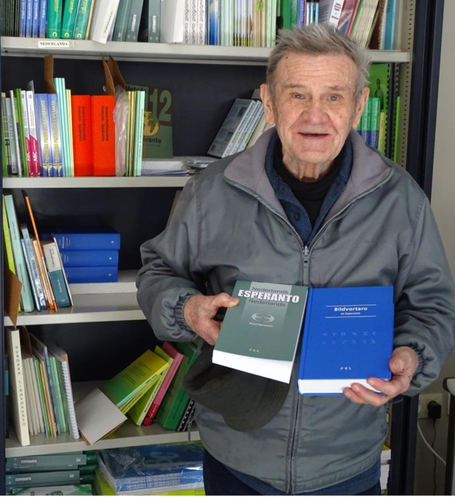 Petro montras du verkojn kiujn li kreis.